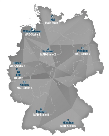 MAD-Stellen in Deutschland